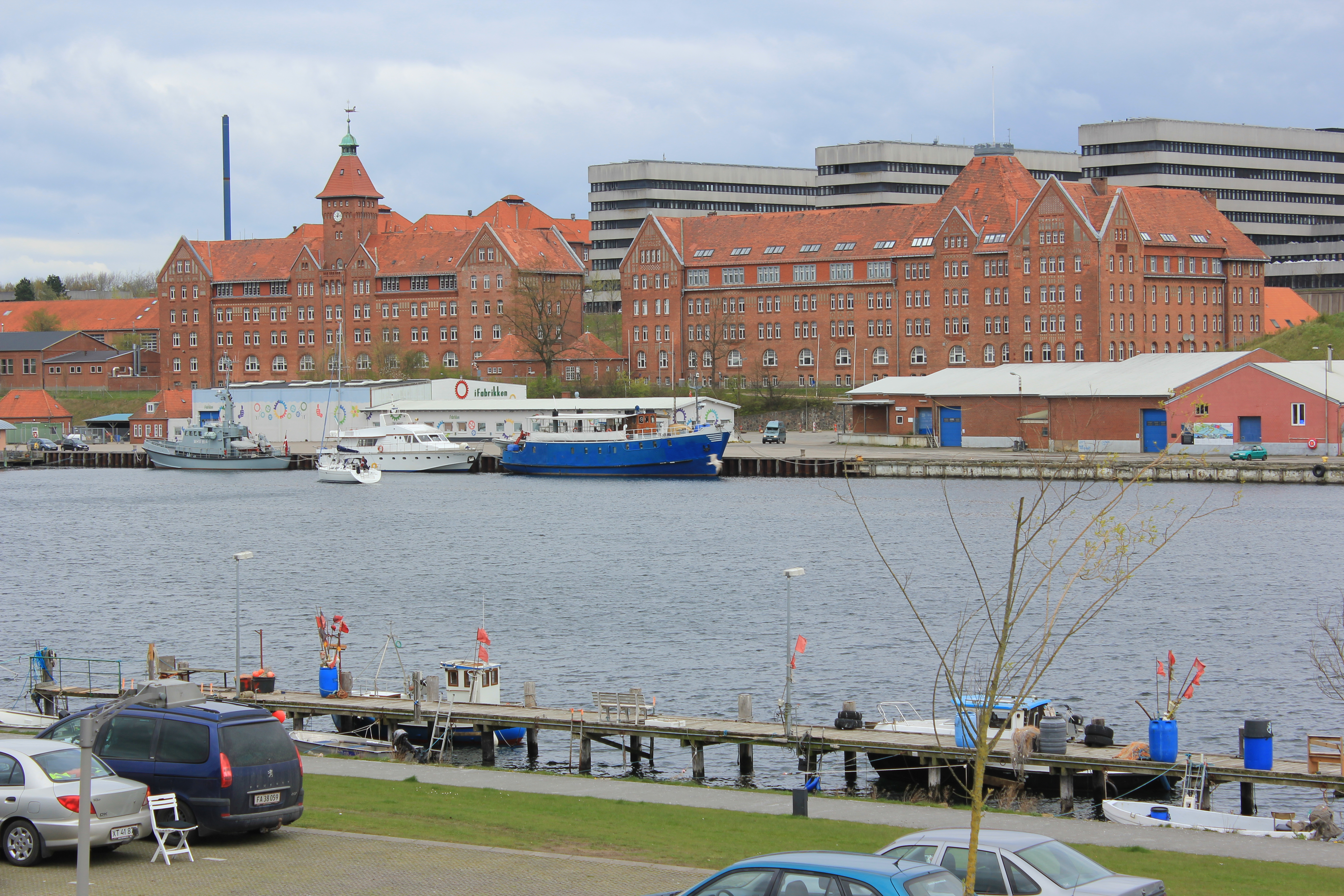 Die Sonderburg Kaserne (2014), Bild 005